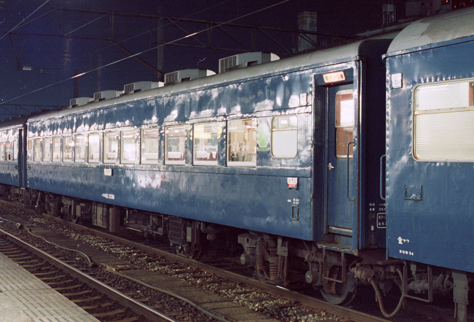 国鉄スロ62 2056